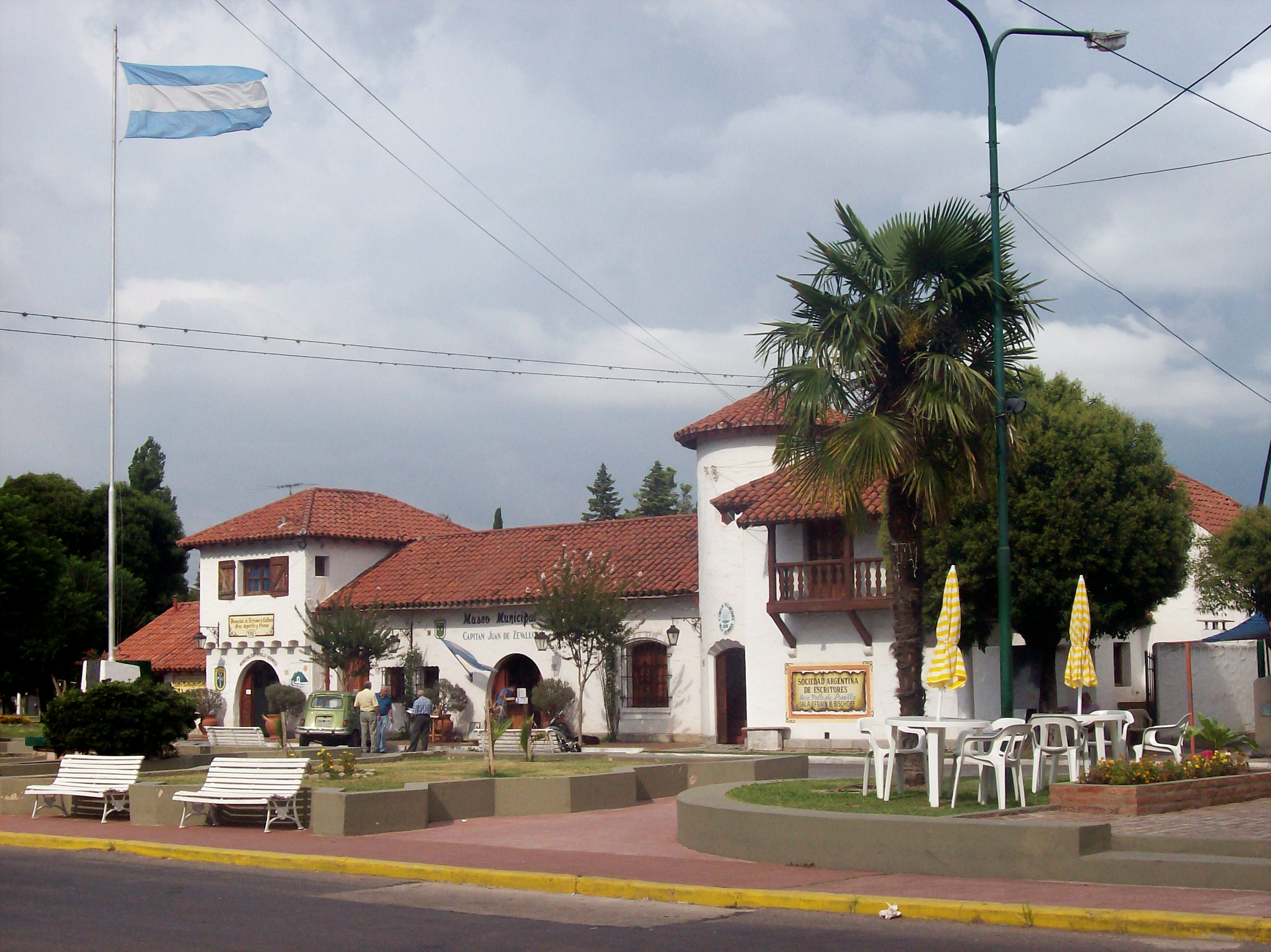 Estación de Valle Hermoso, provincia de Córdoba, Argentina, convertida en Museo y Centro Cultural. Foto tomada de E a O